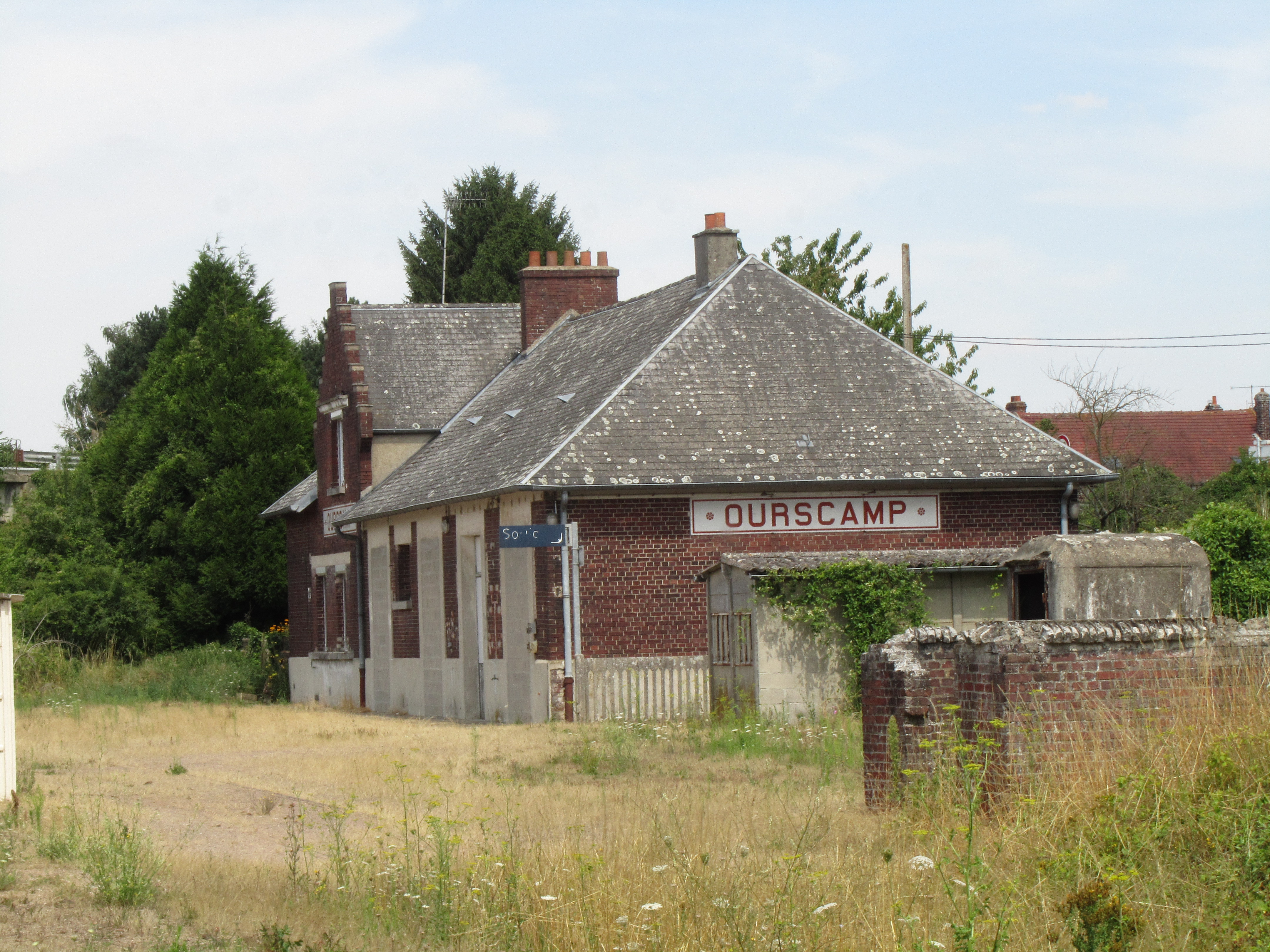 BV d'Ourscamps